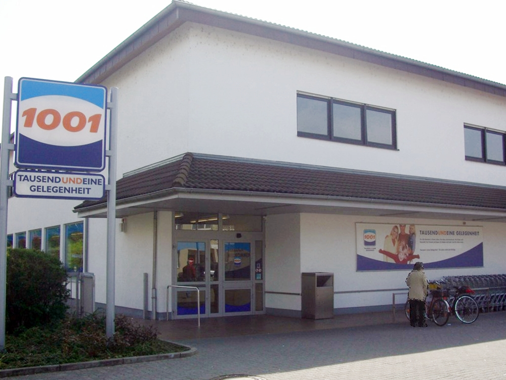 Geschäft 1001 Gelegenheit (ALDI) in Mannheim-Waldhof